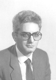 Fotografia ufficiale dell'On. Sergio Mattarella (anno 1983) Licensing Categoria:Deputati della IX legislatura della Repubblica Italiana Categoria:Deputati della Democrazia Cristiana Categoria:Politici della Democrazia Cristiana